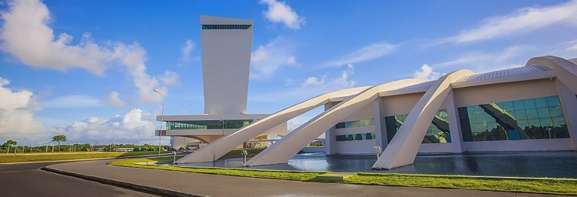 O Centro de Convenções de João Pessoa, é um dos locais mais amplos e modernos do país.